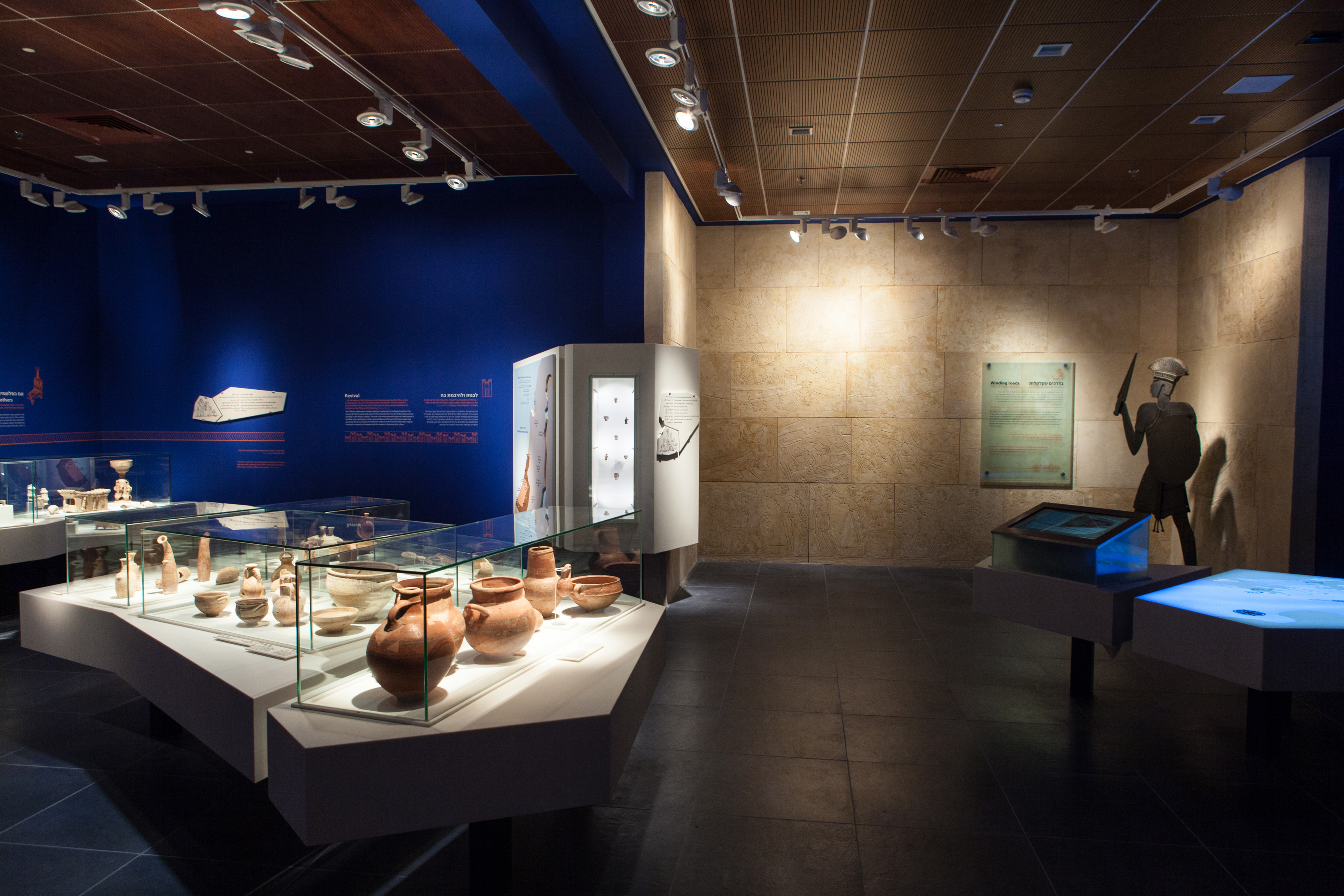 תצוגת הקבע "עולמם של הפלשתים" דיגיטציה לצד ארכיאולוגיה